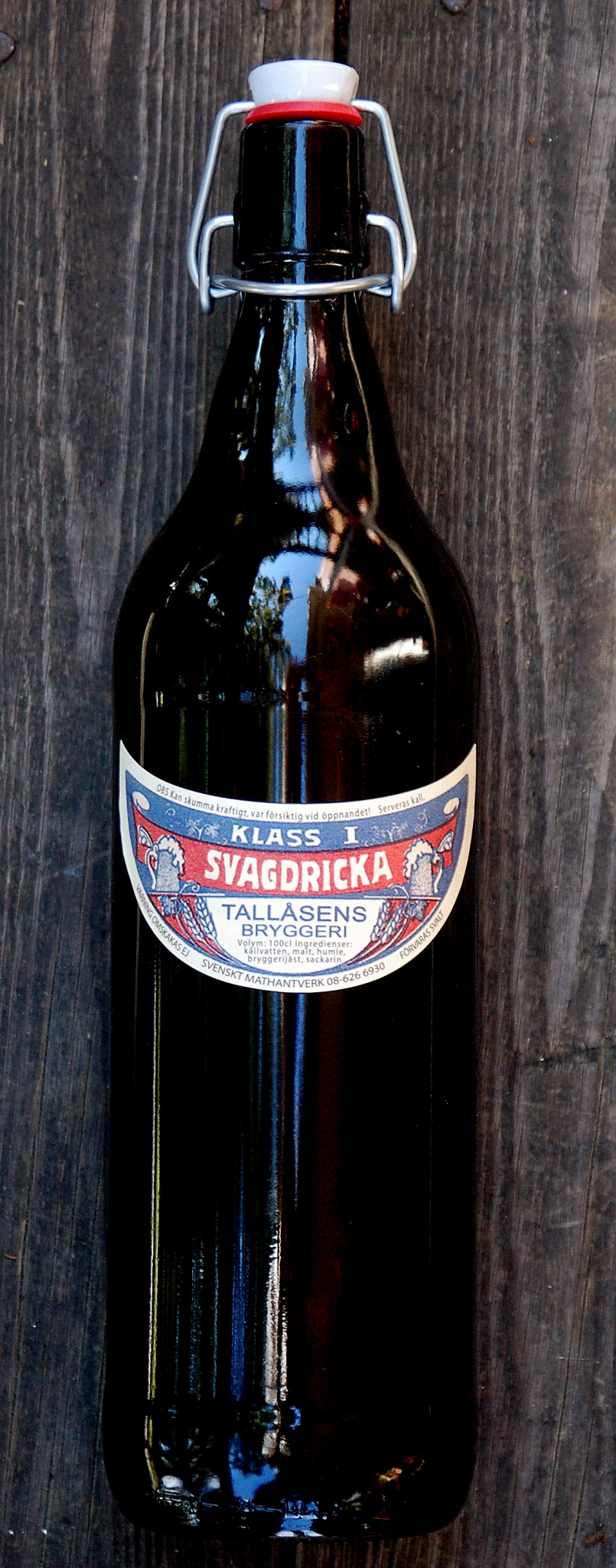 En litersflaska med svagsricka från Tallåens Bryggeri